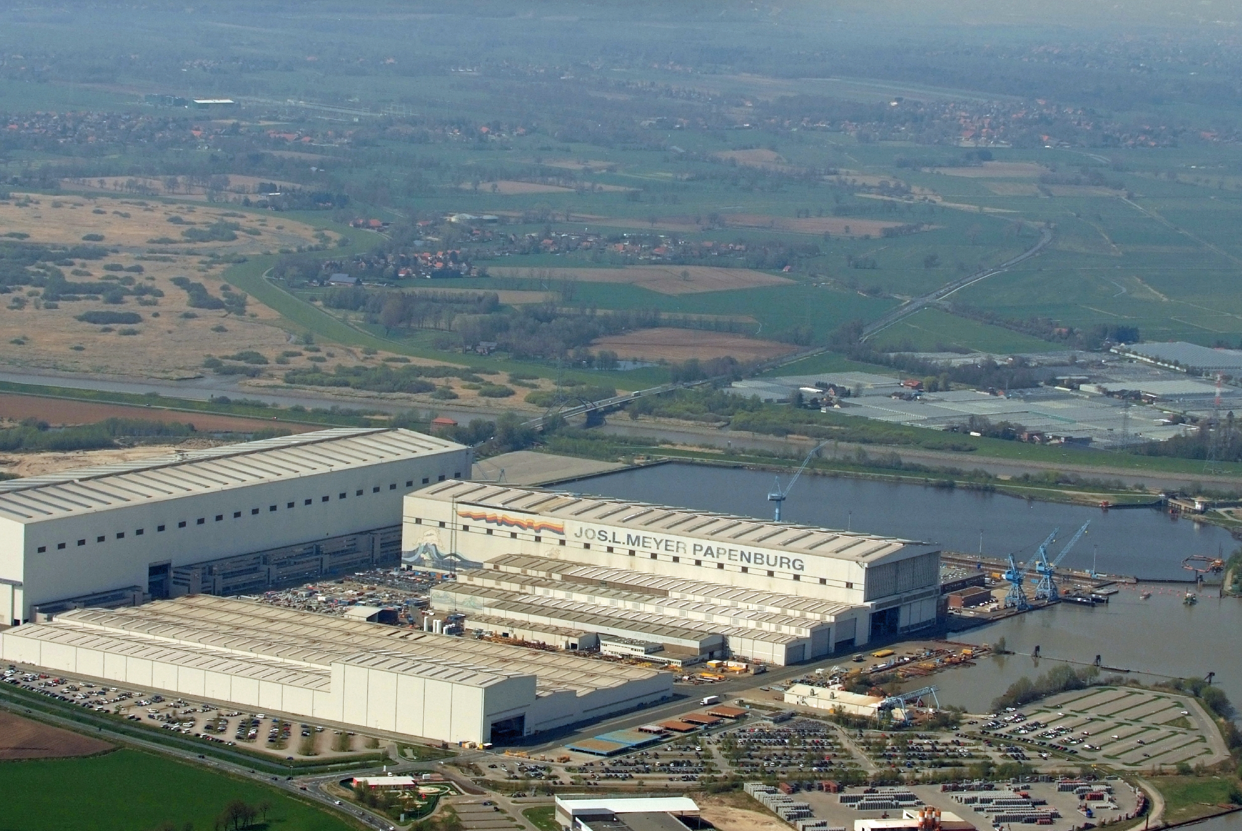 Fotoflug von Nordholz-Spieka nach Oldenburg und Papenburg